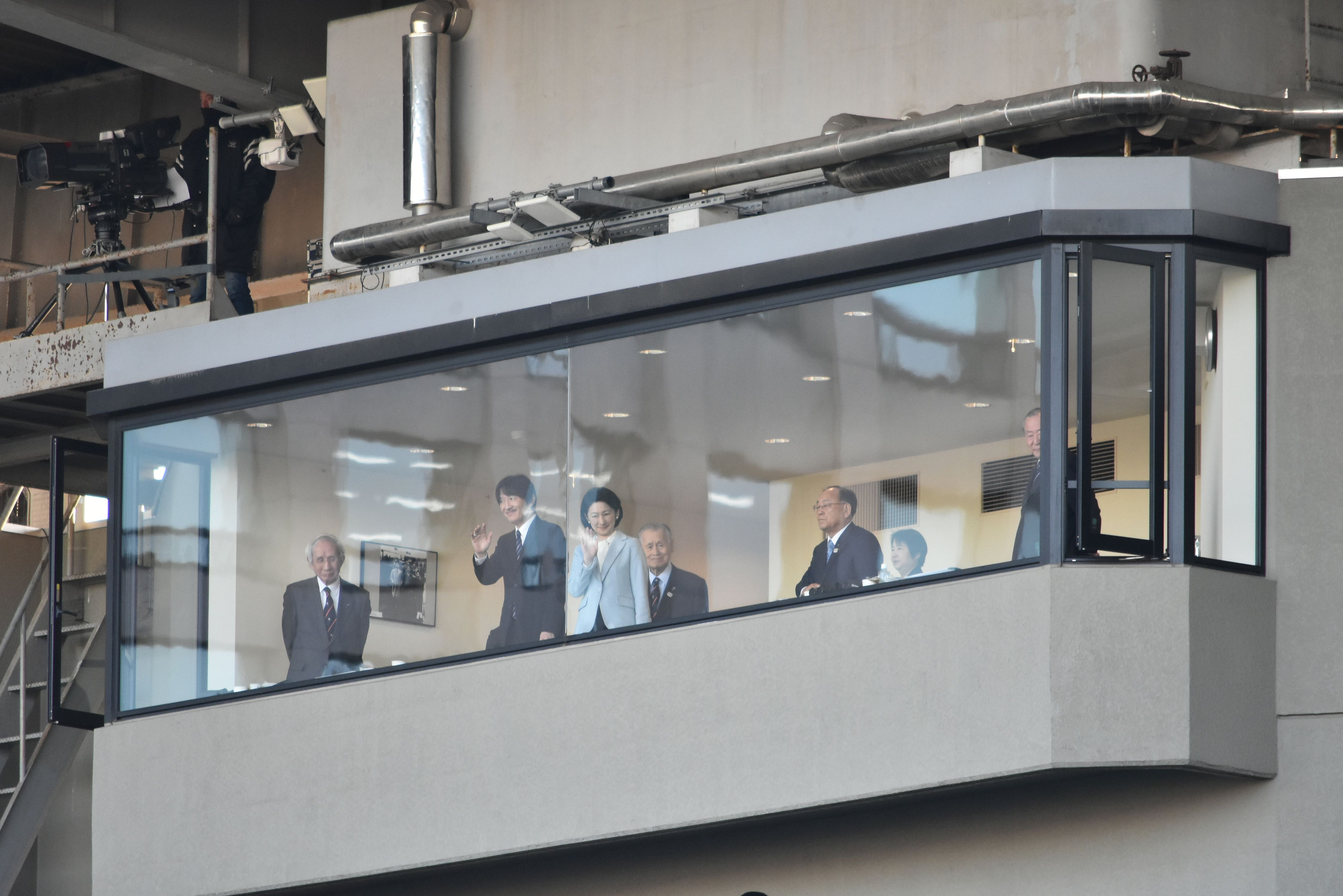 トップリーグ 秋篠宮ご夫妻ご観覧